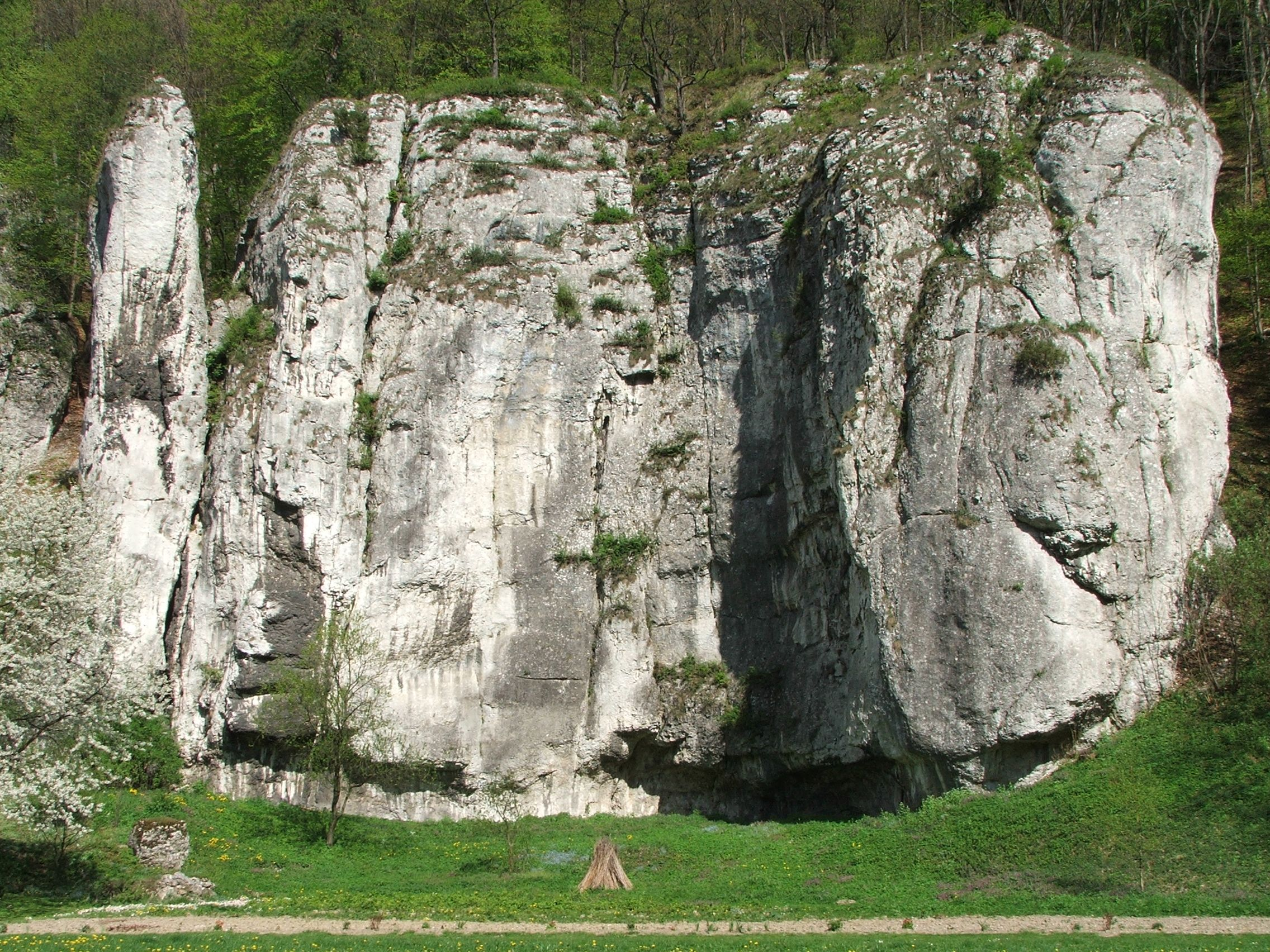 Dolina Prądnika (Ojcowski Park Narodowy)